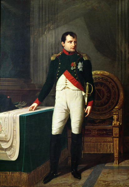 Portrait de Napoléon 1er en uniforme de chasseur à cheval de la garde, commande de la ville de Paris.